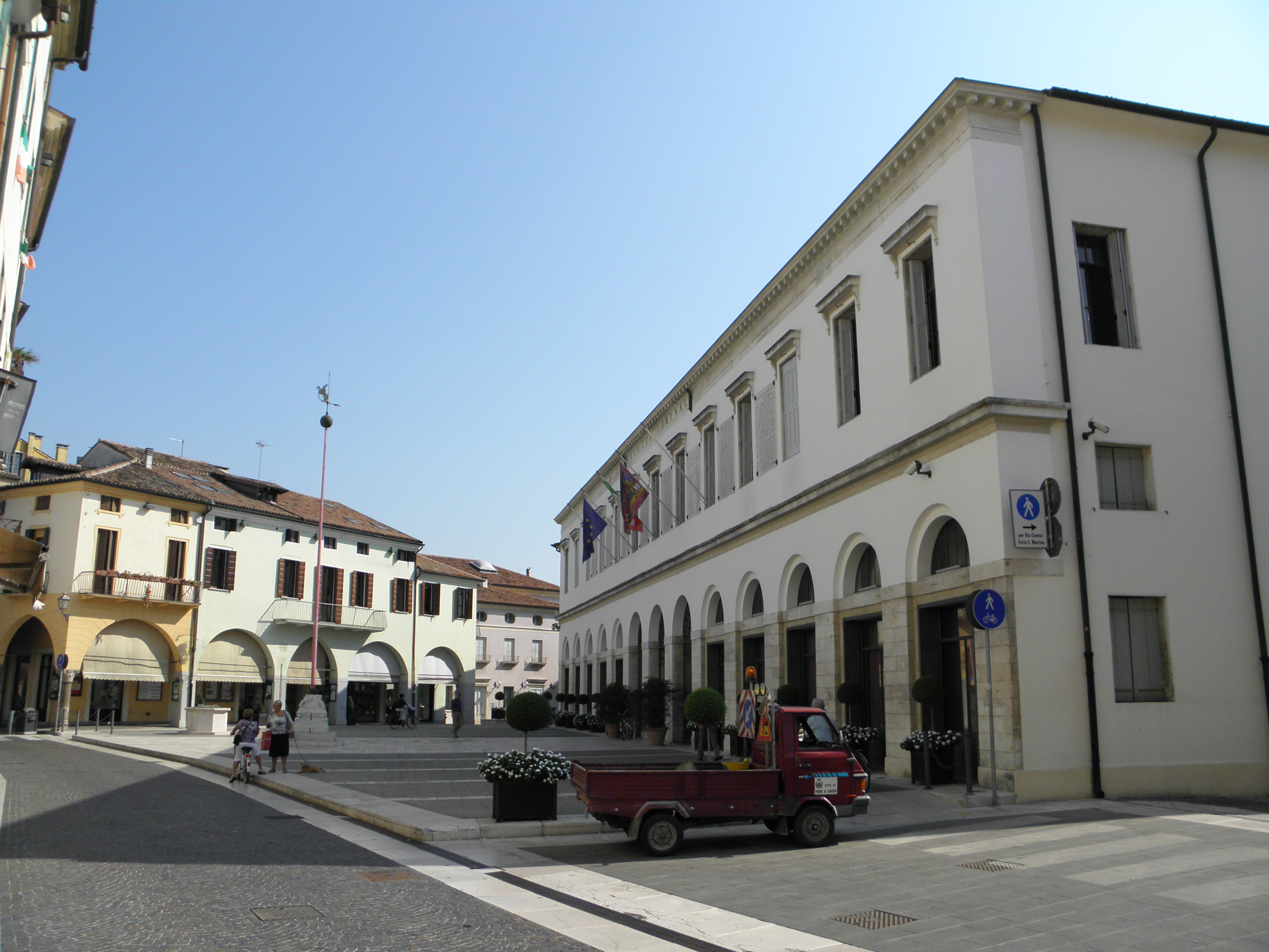 Piove di Sacco: Piazza Matteotti e, sulla destra, Palazzo Jappelli sede municipale.